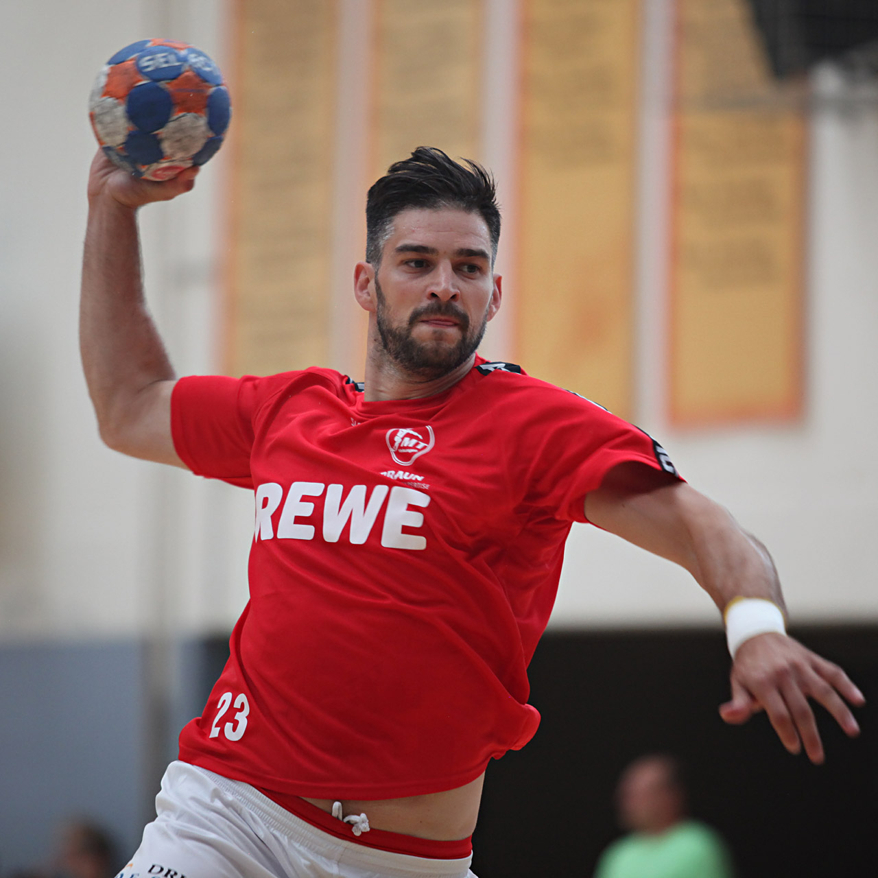 Nenad Vučković, Spieler der MT Melsungen. Fotografiert am 14. Juli 2015 in der Heppenheimer Nibelungenhalle beim Maisch Cup.